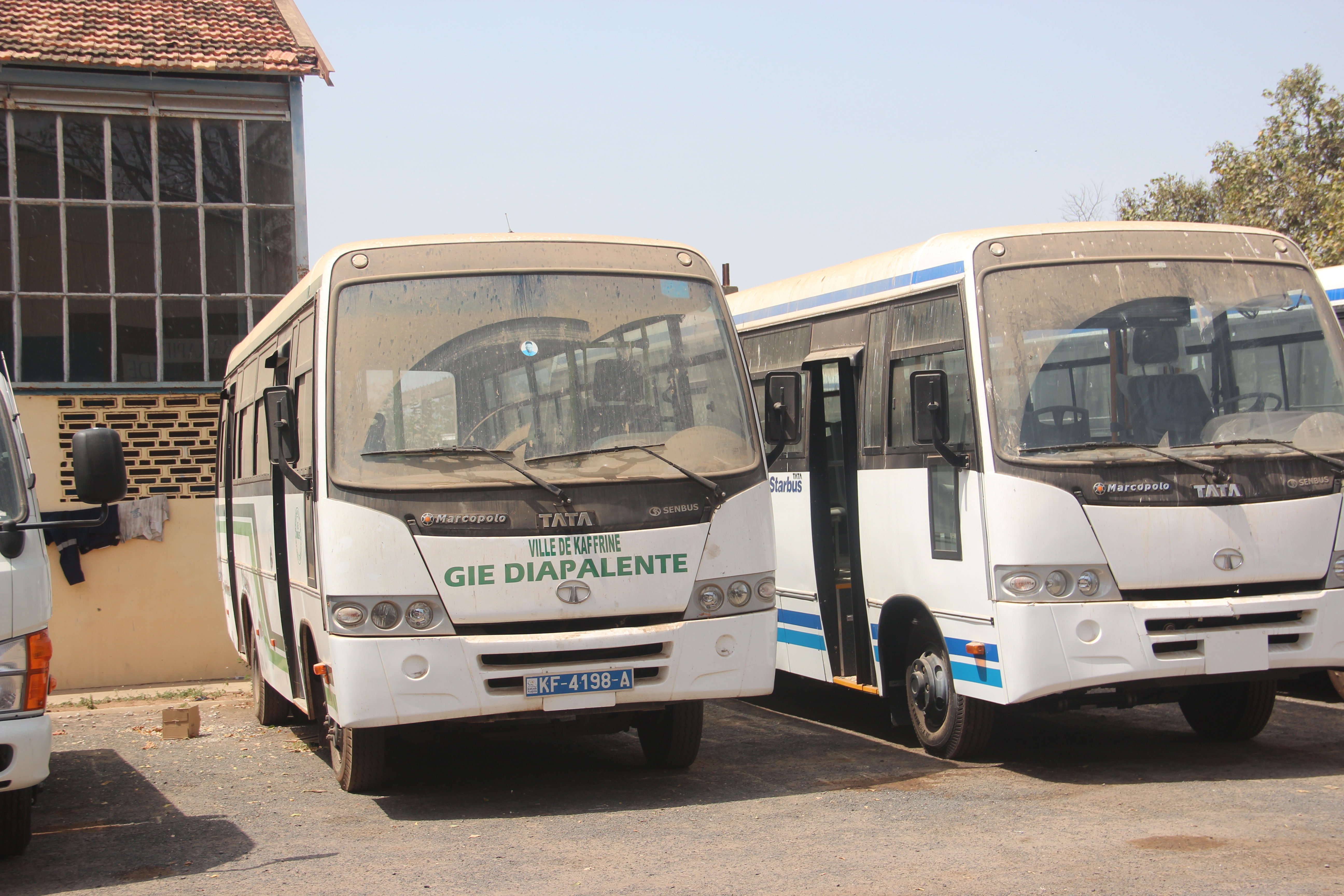 Bus du GIE Diapalente (Kaffrine) à l'usine Senbus de Thiès (Sénégal). This is an image with the theme "Africa on the Move or Transport" from: Senegal